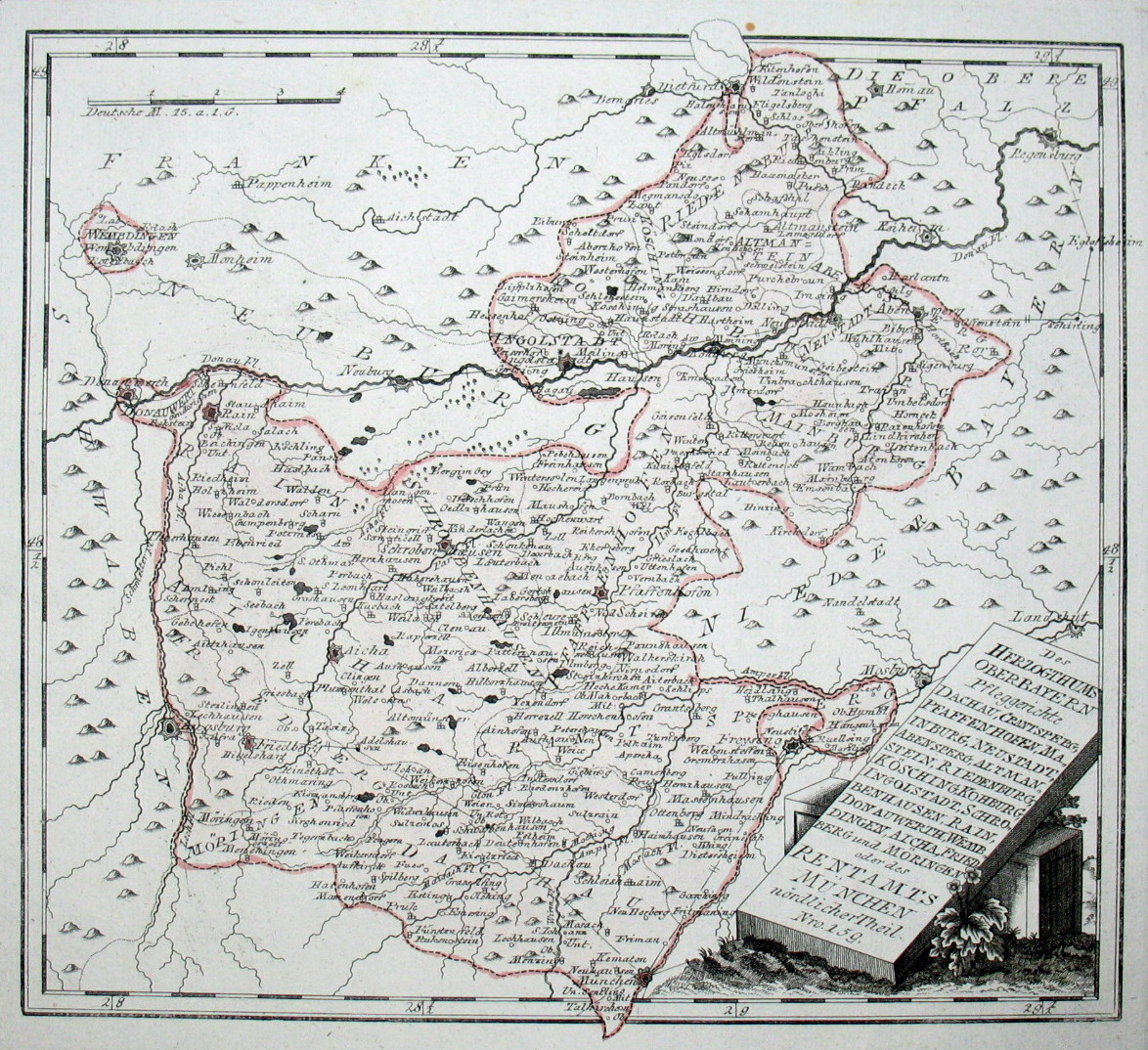 Des Herzogthums Oberbayern Pfleggerichte Dachau, Crantsperg, Pfaffenhofen, Mainburg, Neustadt, Abensperg, Altmanstein, Riedenburg, Kösching, Kohburg, Ingolstadt, Schrobenhausen, Rain, Donauwerth, Wembdingen, Aicha, Friedberg und Möringen oder des Rentamts München nördlicher Theil. Nro. 159. Kolorierter Kupferstich